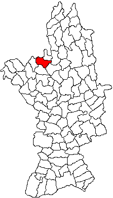 Categorie:Hărţi ale judeţului Olt